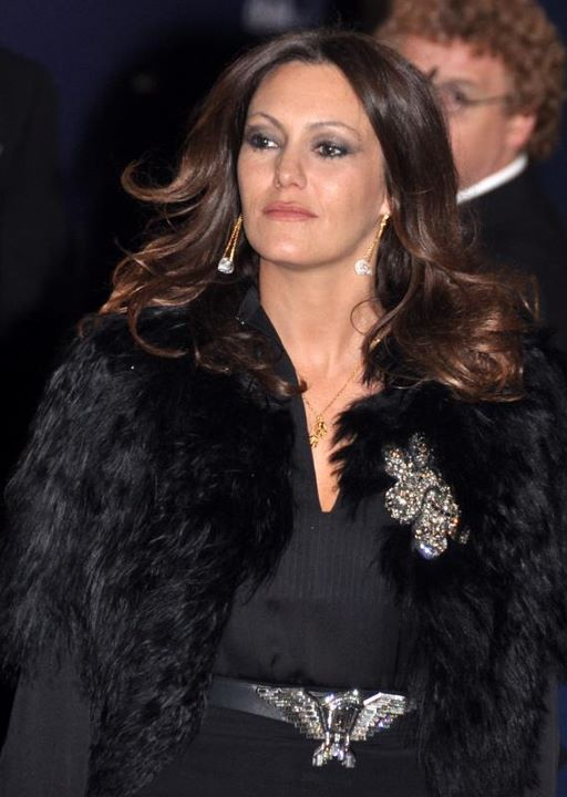 Karole Rocher à la cérémonie des César